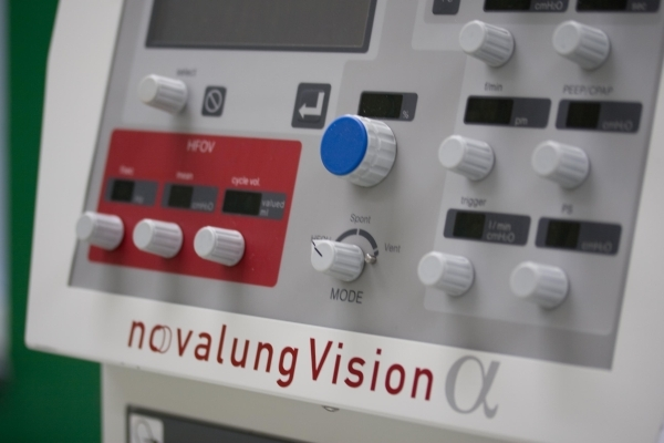 Intensivbeatmungsgerät Vision α (HFOV)